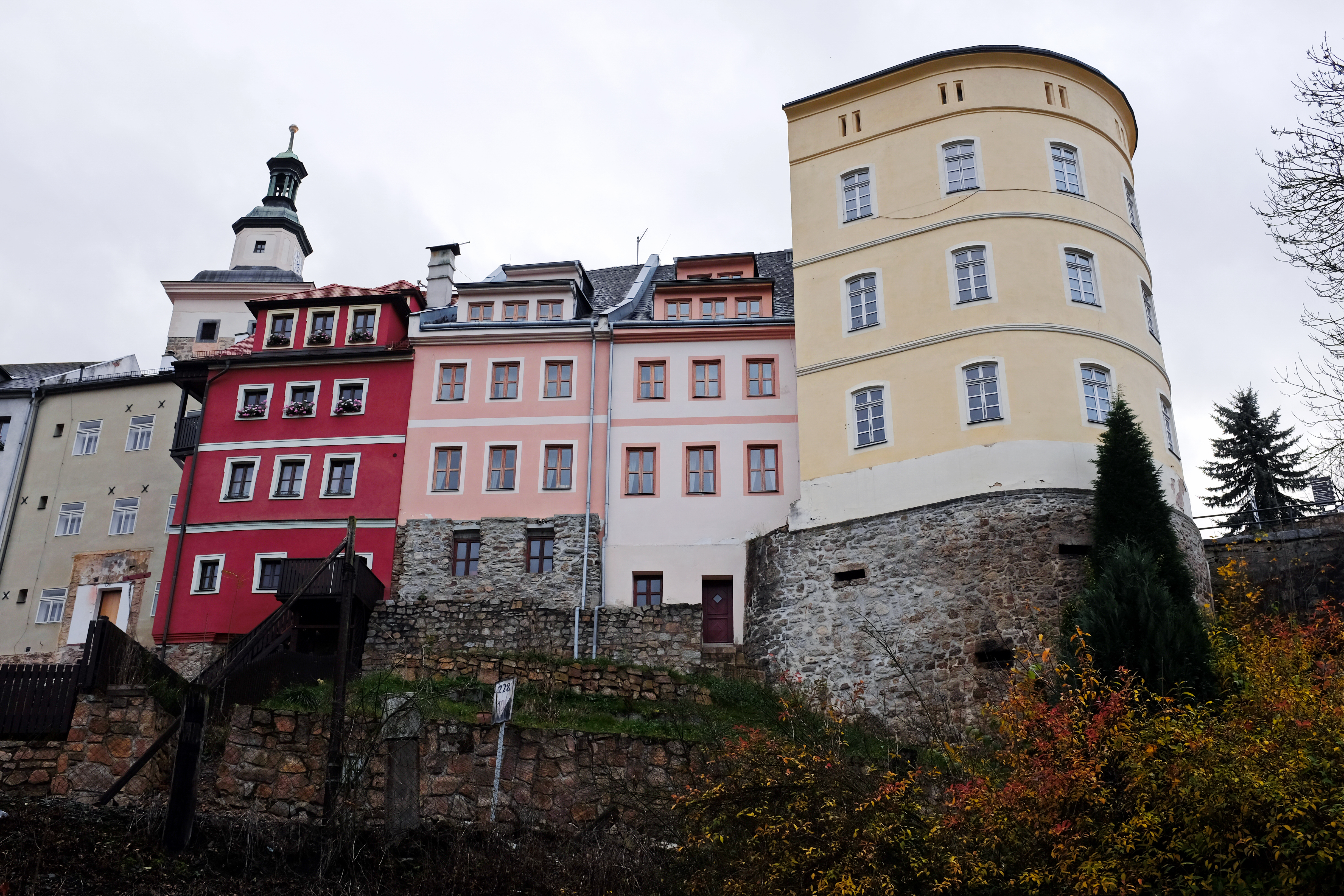 Městské opevnění, stará bašta, Loket (okres Sokolov).